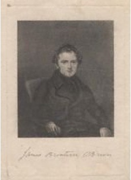 James Bronterre O'Brien (1805-1864)